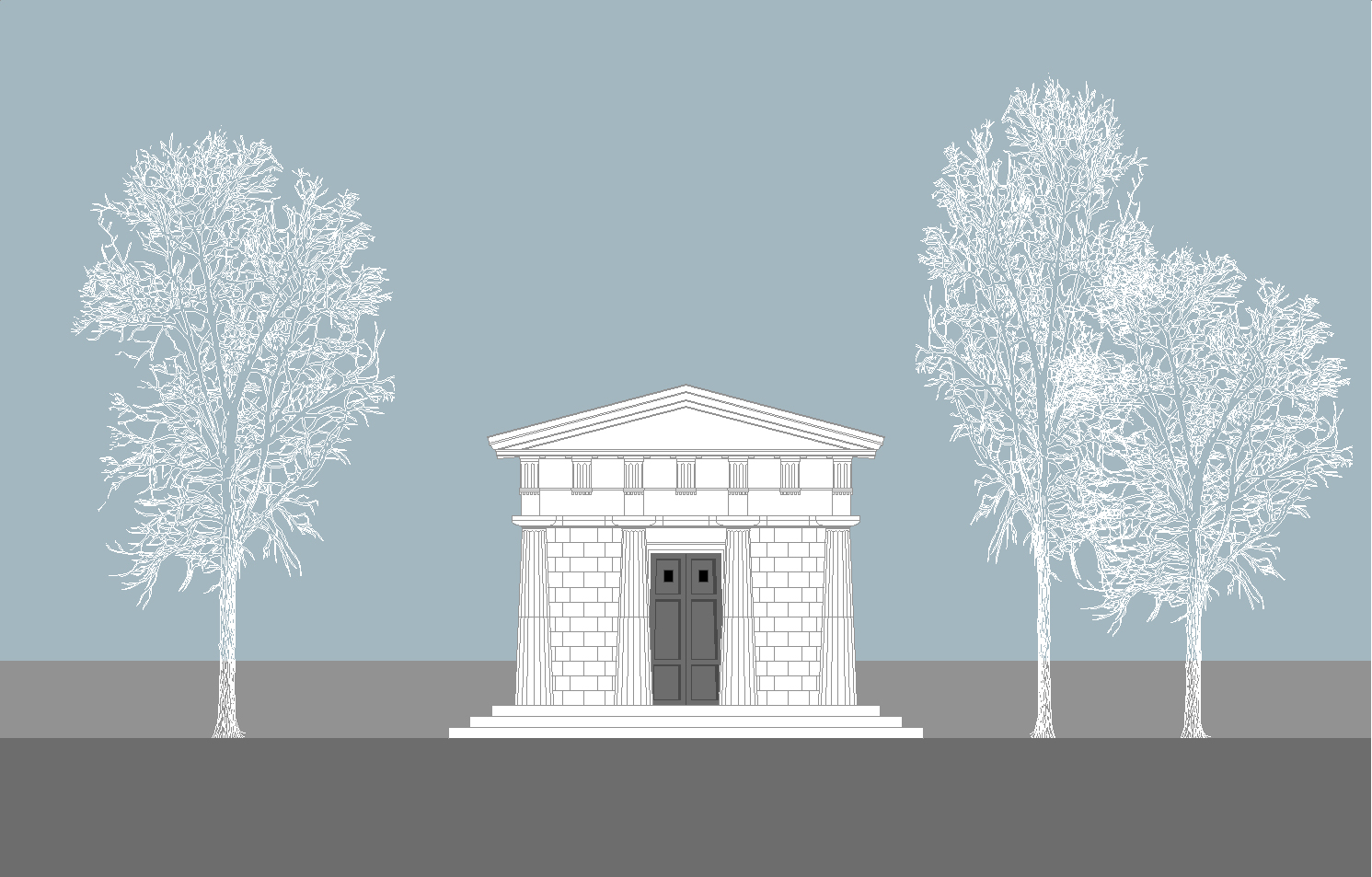 Mausoleum der Familie von Hoym, Ansicht SW. © Eiko Behrens